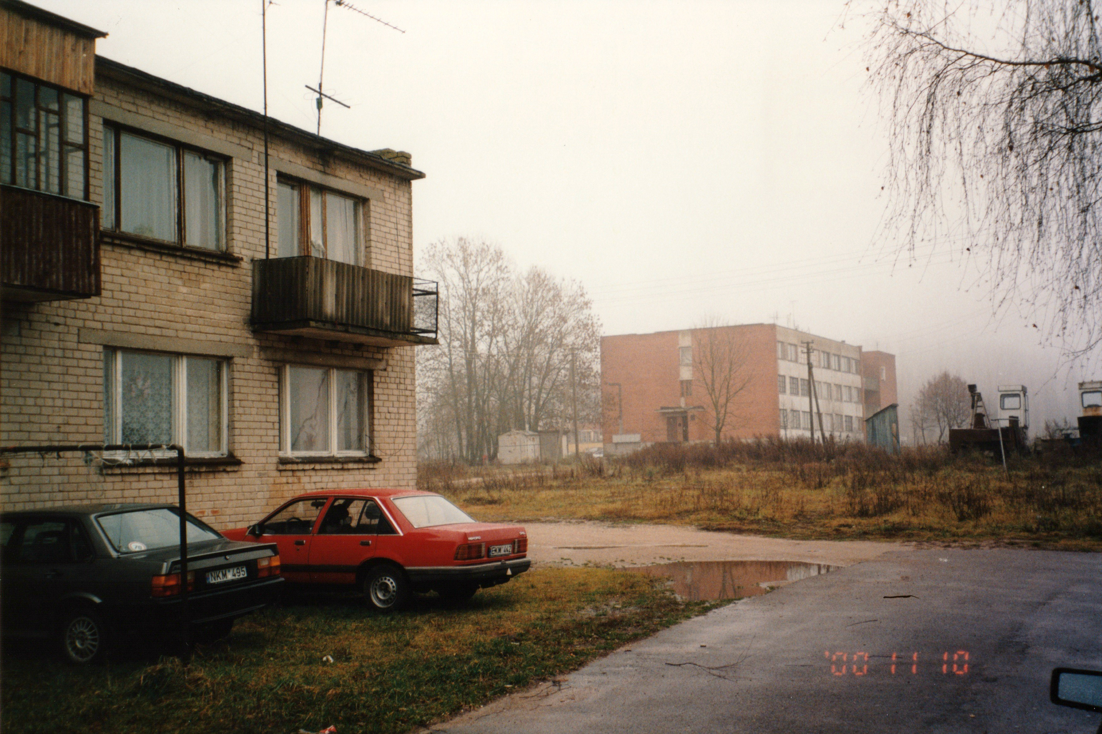 Batniava